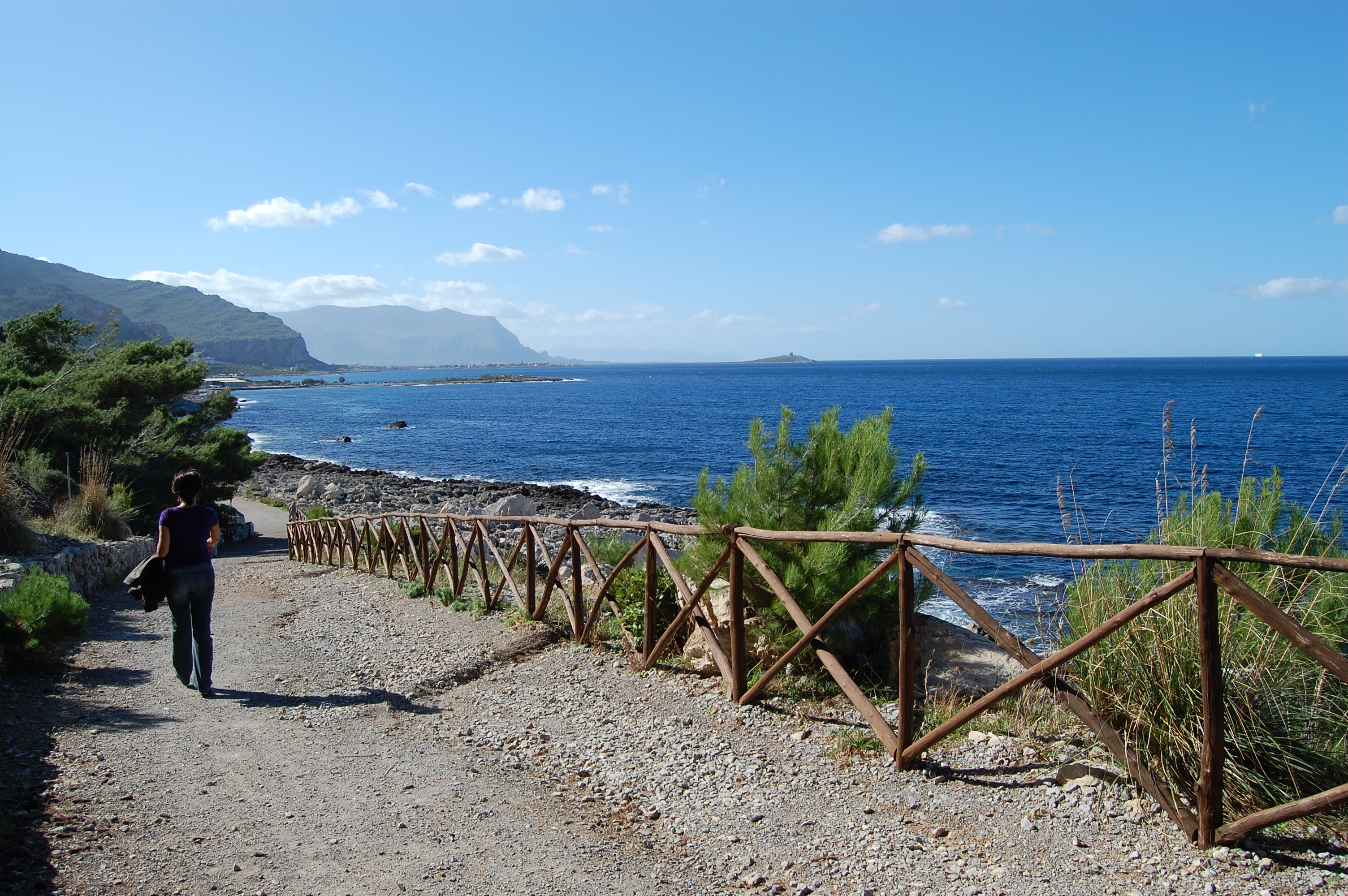 Riserva naturale Capo Gallo